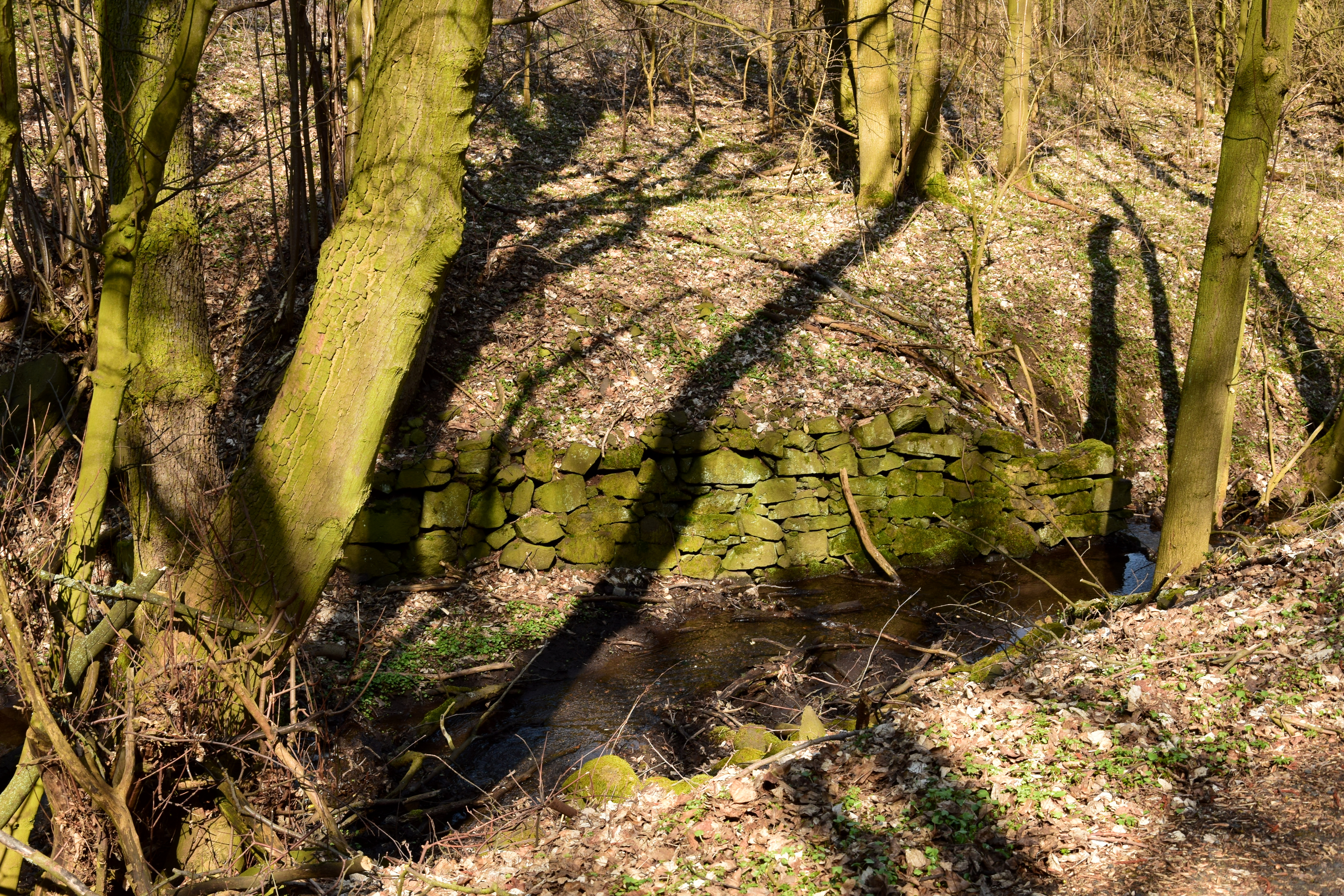 Zvoníčkov – potok